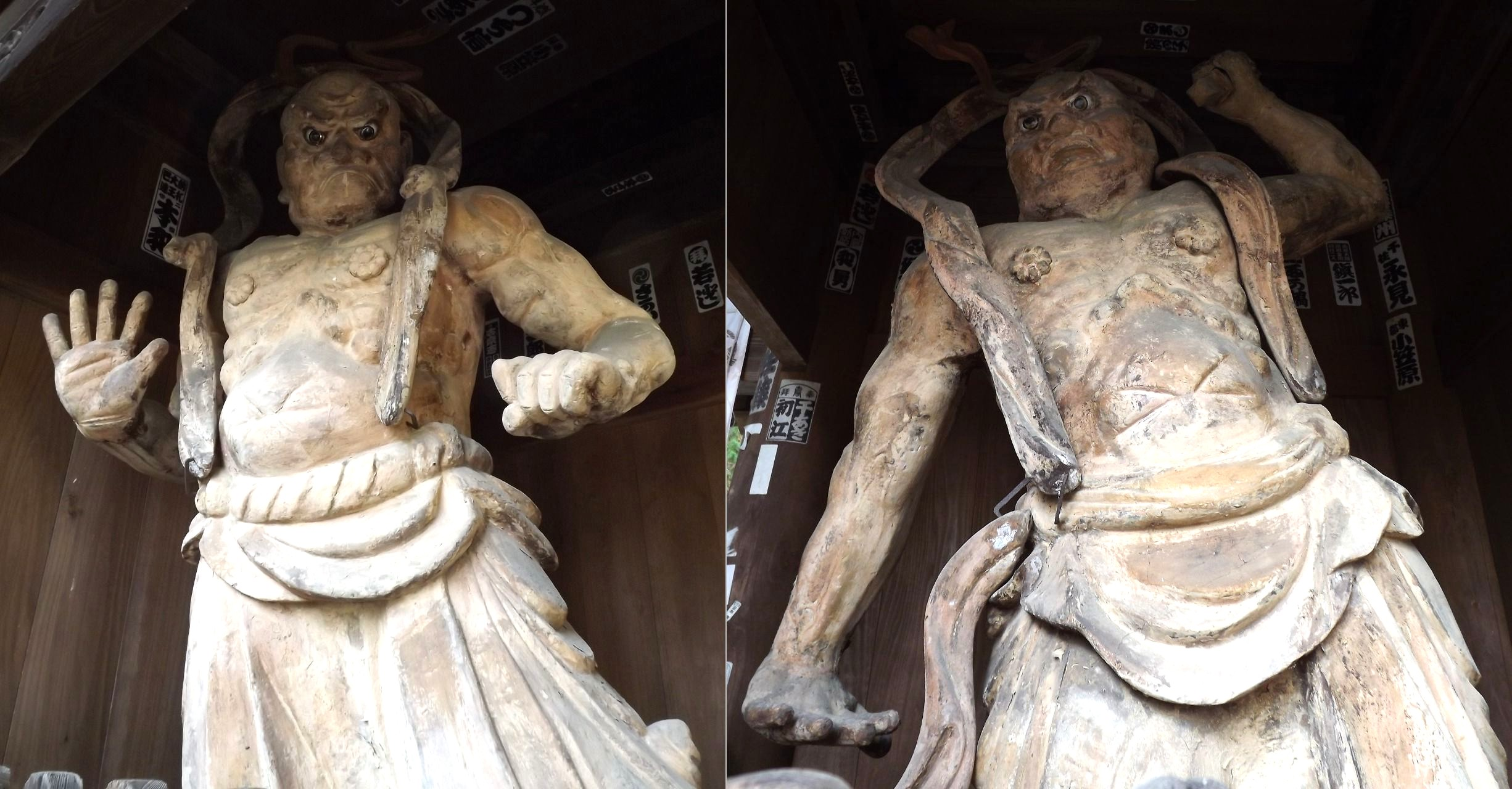 神恵院の仁王像